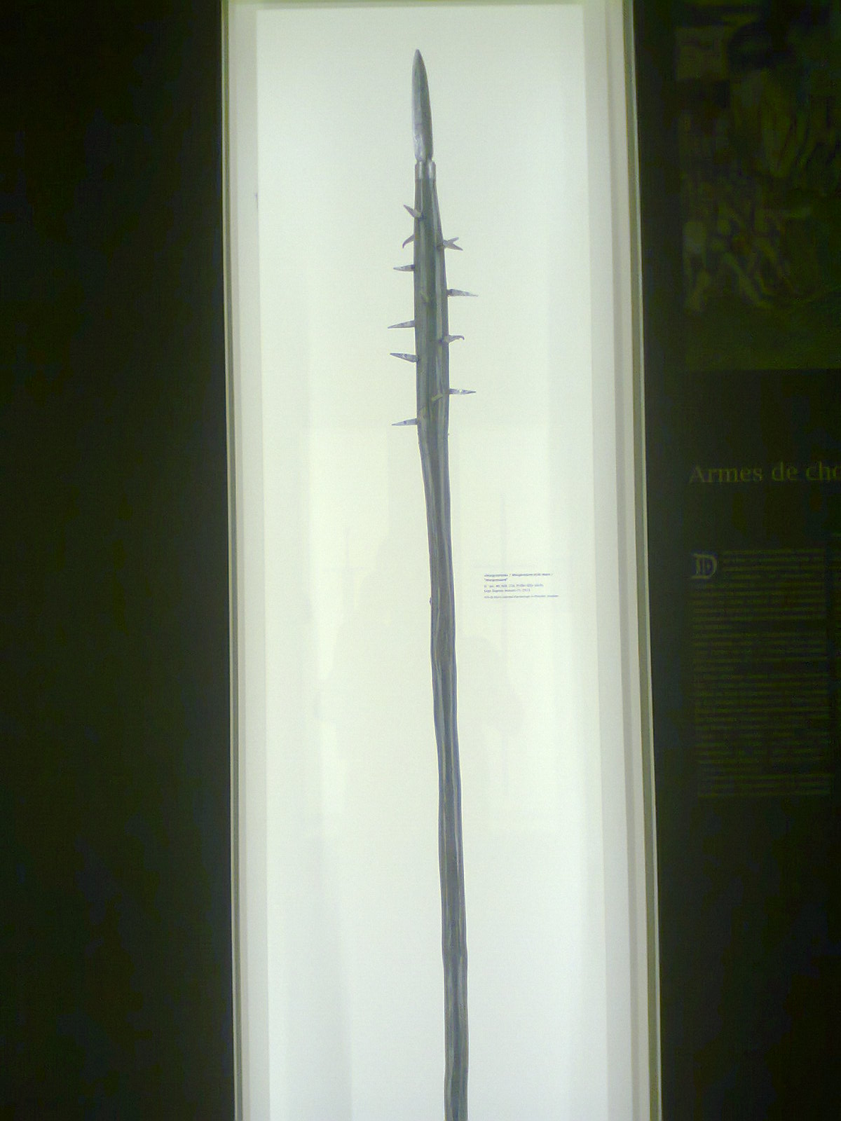 Morgarten chillon